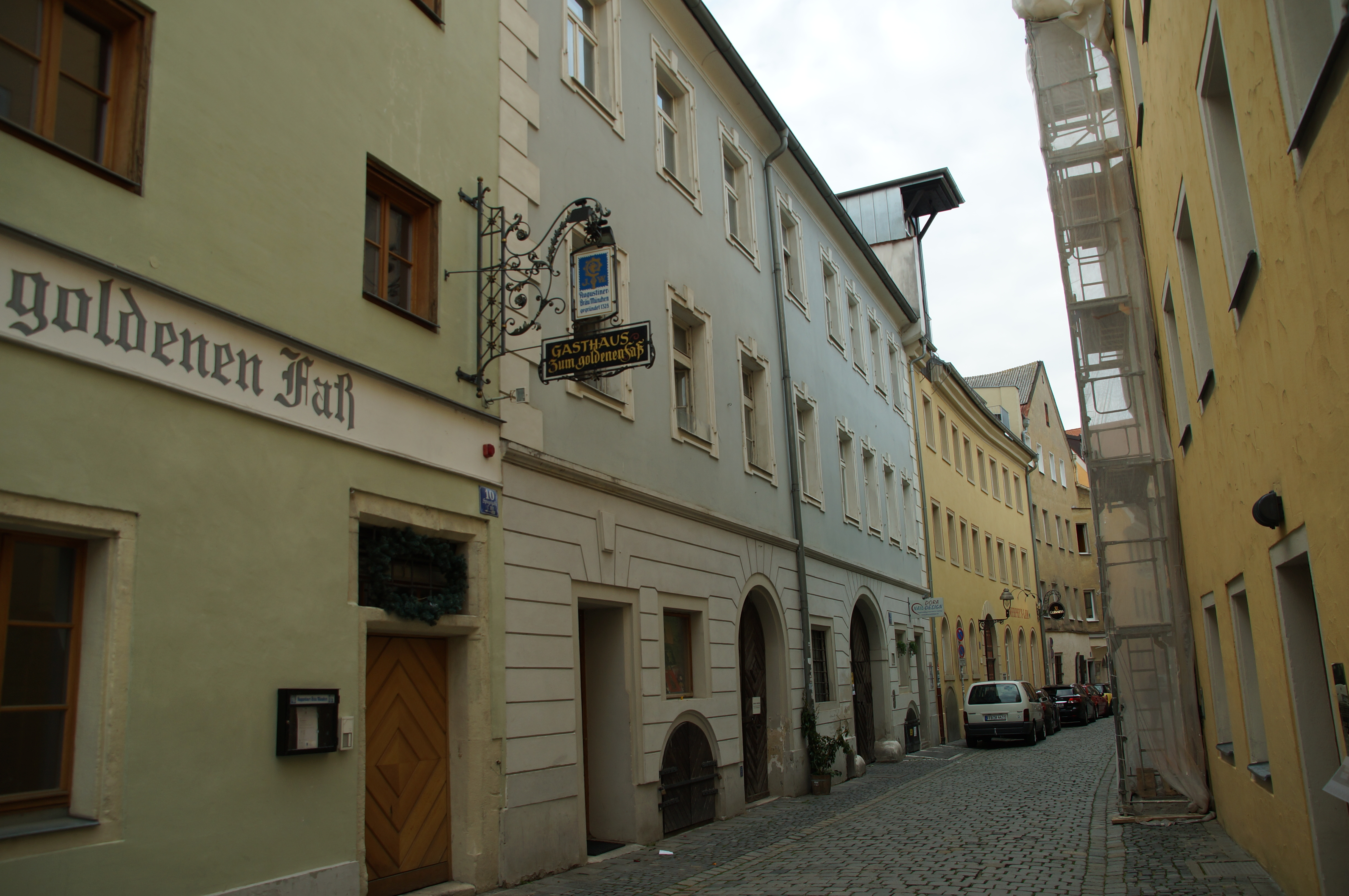 Dreigeschossiger und traufständiger Satteldachbau, Fassade mit Bänderung und geohrten Fensterrahmen, im Kern frühgotisch über romanischem Keller, Fassade barock, Inschrifttafel mit Literanummer C 100, 19. Jh.This is a photograph of an architectural monument.